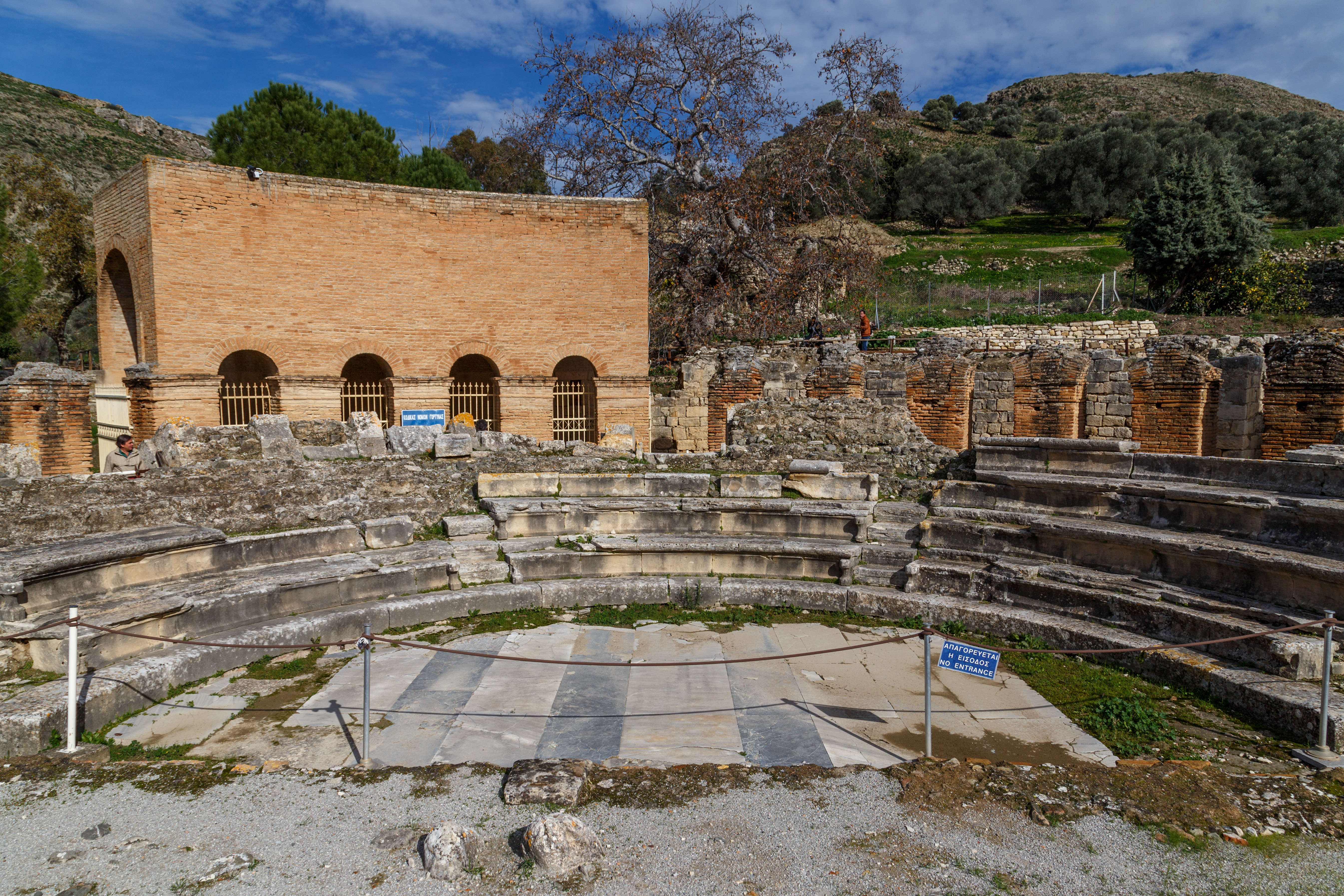 «Ωδείο Γόρτυνας»